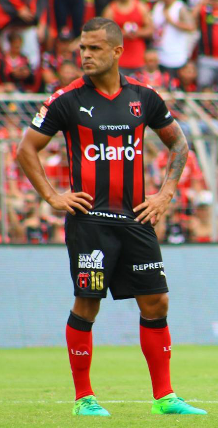 06-08-2017. José Luis Cordero como jugador de Alajuelense en un partido contra el Santos de Guápiles.